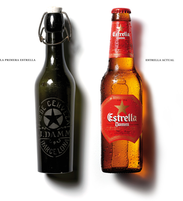 Primera y actual botella de Estrella Damm juntas.